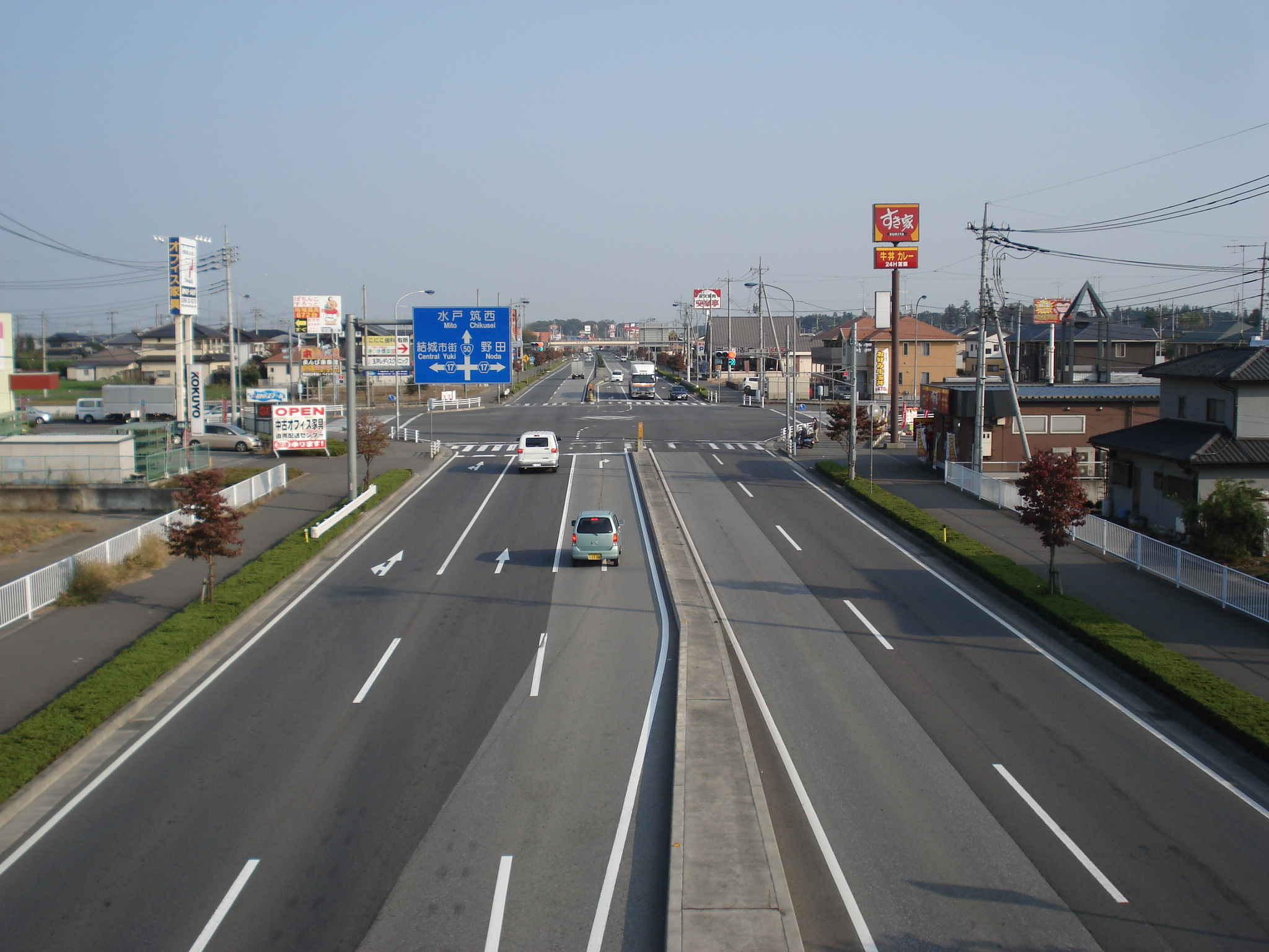 一般国道50号結城バイパス 茨城県結城市結城